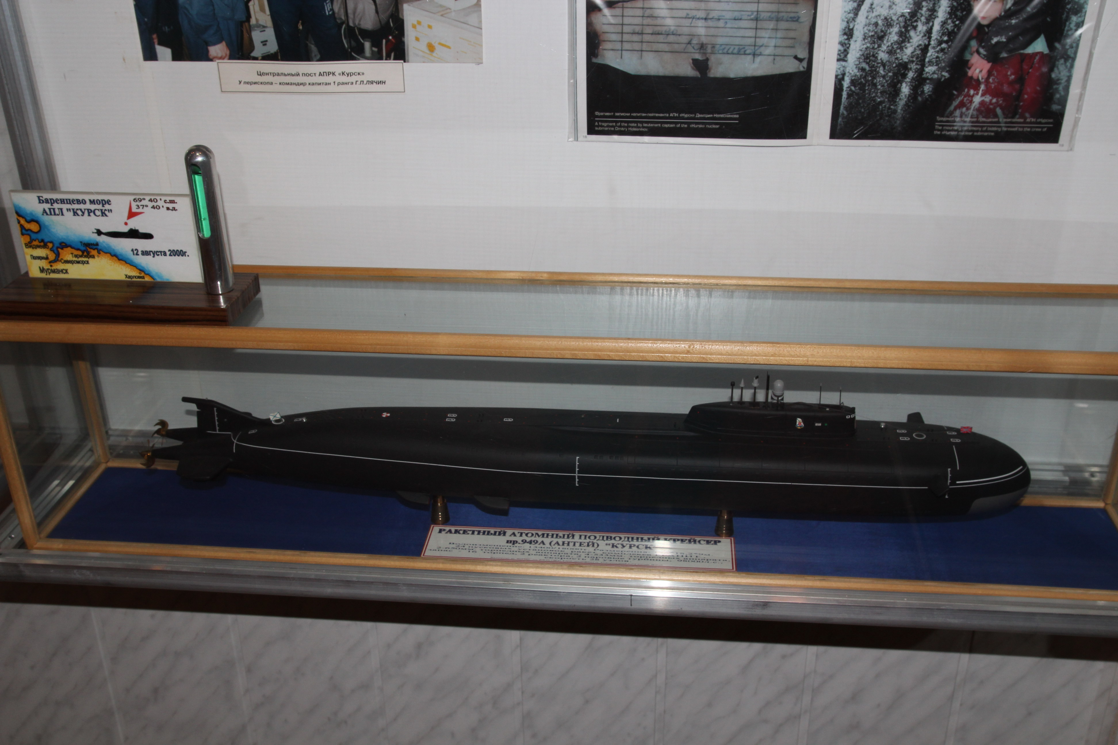 Модель подлодки Курск